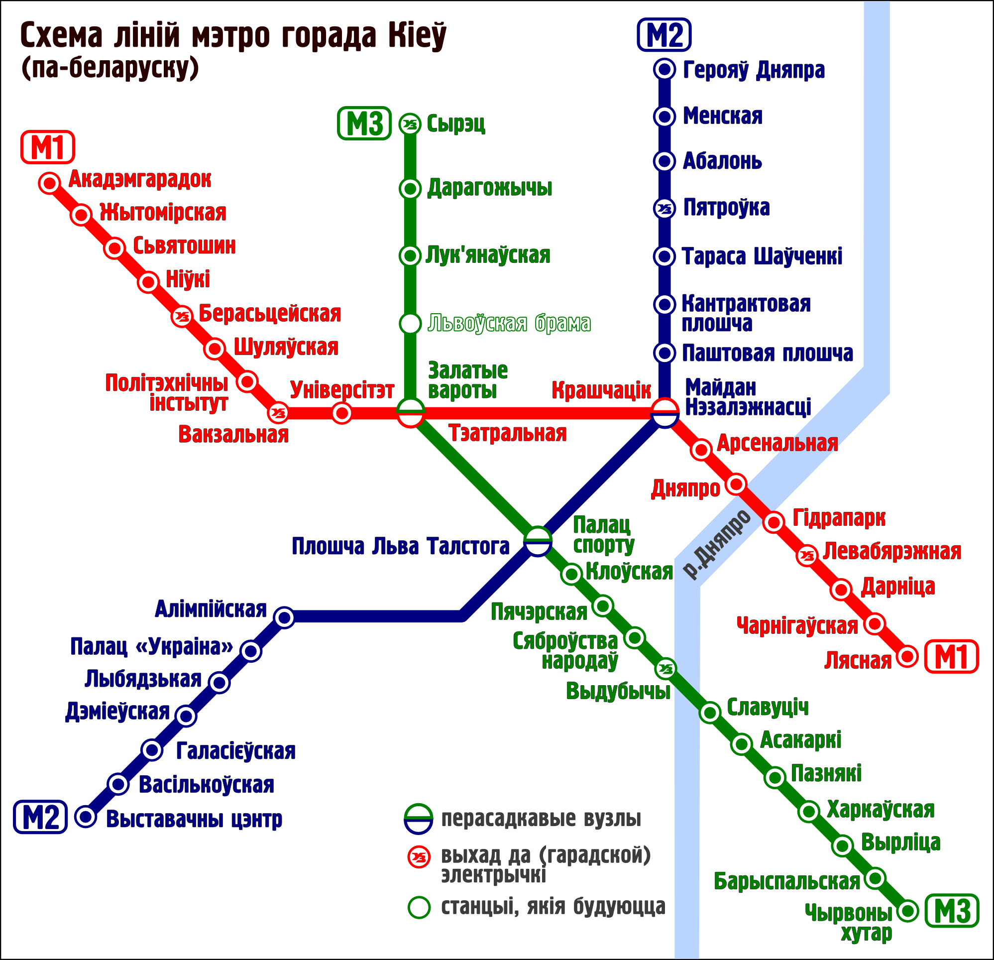 Схема кіеўскага метро па-беларуску.